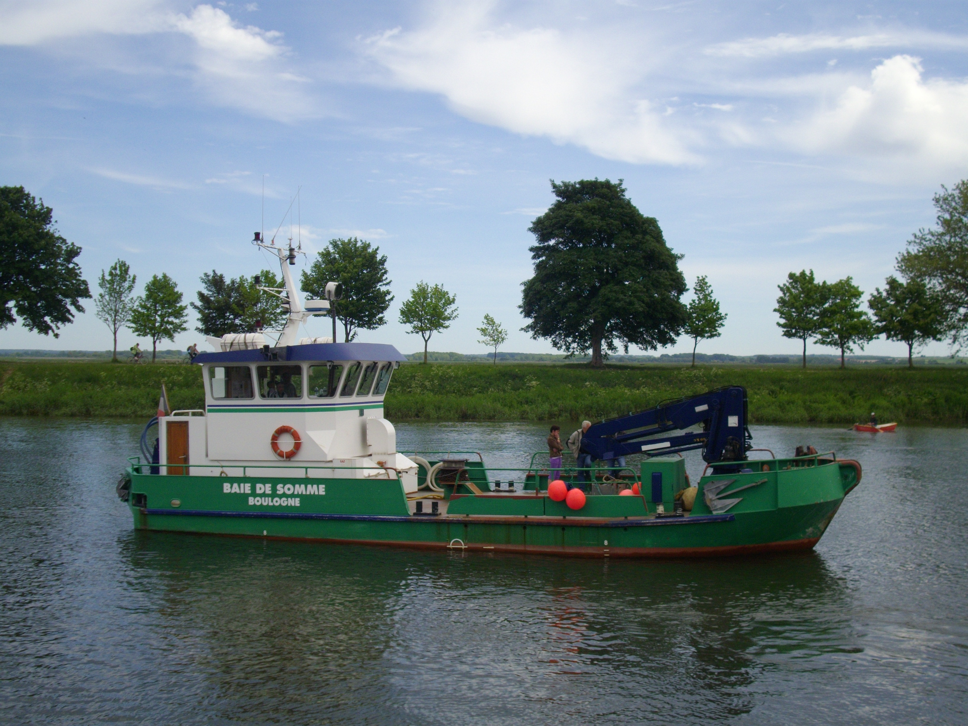 Le baliseur Baie de Somme à Saint-Valéry-sur-Somme